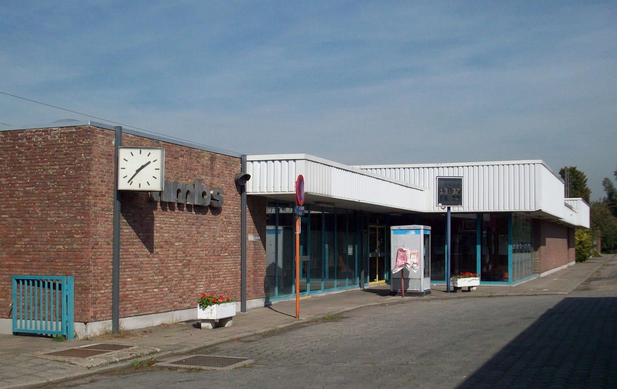 Station Boom